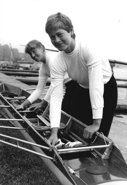 Silvia Fröhlich, Marita Sandig ADN-ZB Mittelstädt 23.8.82-Luzern-Schweiz: Weltmeisterschaften im Rudern- Im Zweier ohne Steuerfrau haben sich Silvia Fröhlich (vorn) und Marita Sandig (beide SC DHfK Leipzig-Foto vom Abschlußtraining in Berlin-Grünau) durch ihren Vorlaufsieg für das Finale am 28.8.82 auf dem Rotsee qualifiziert.